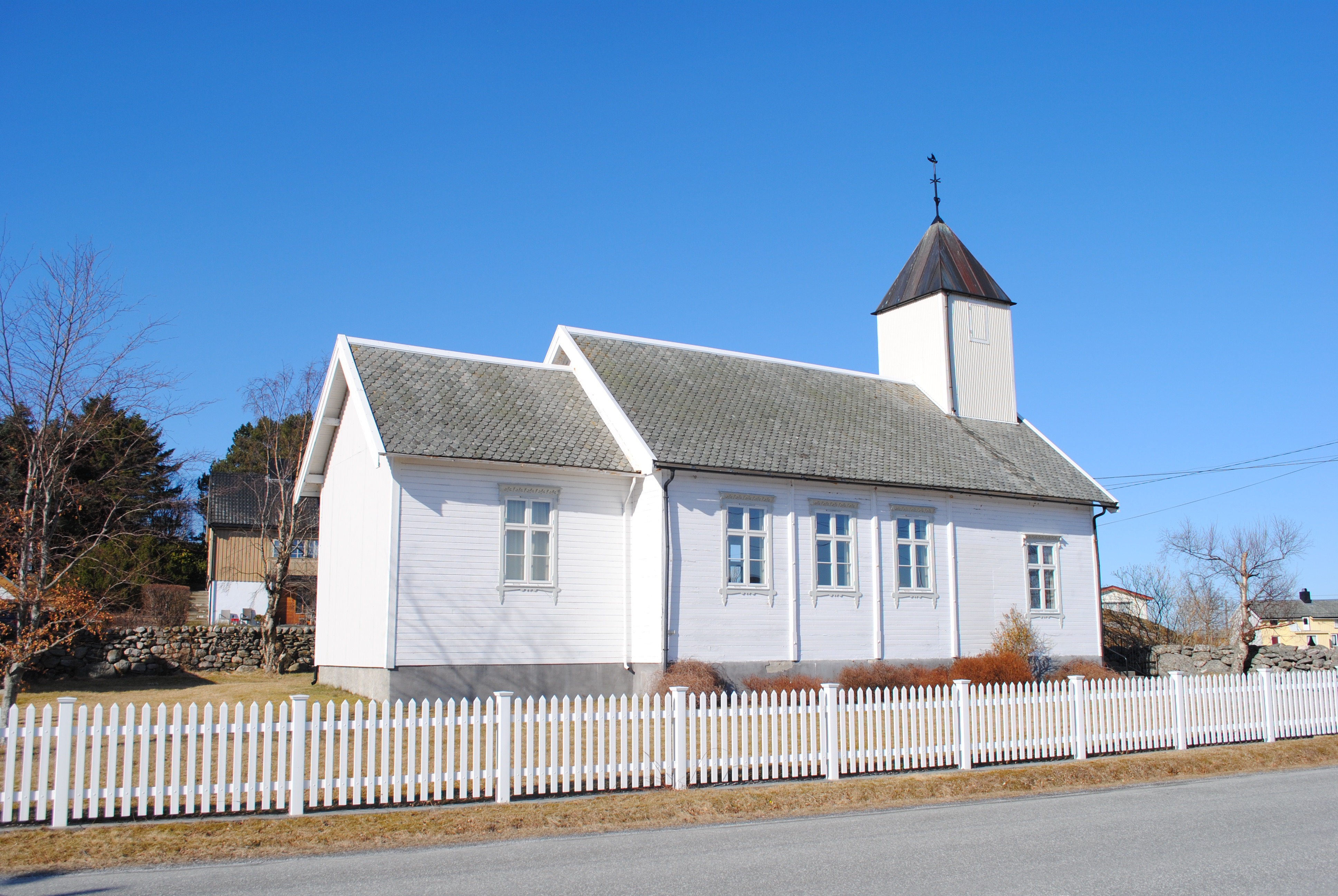 langkirke kirke kapell